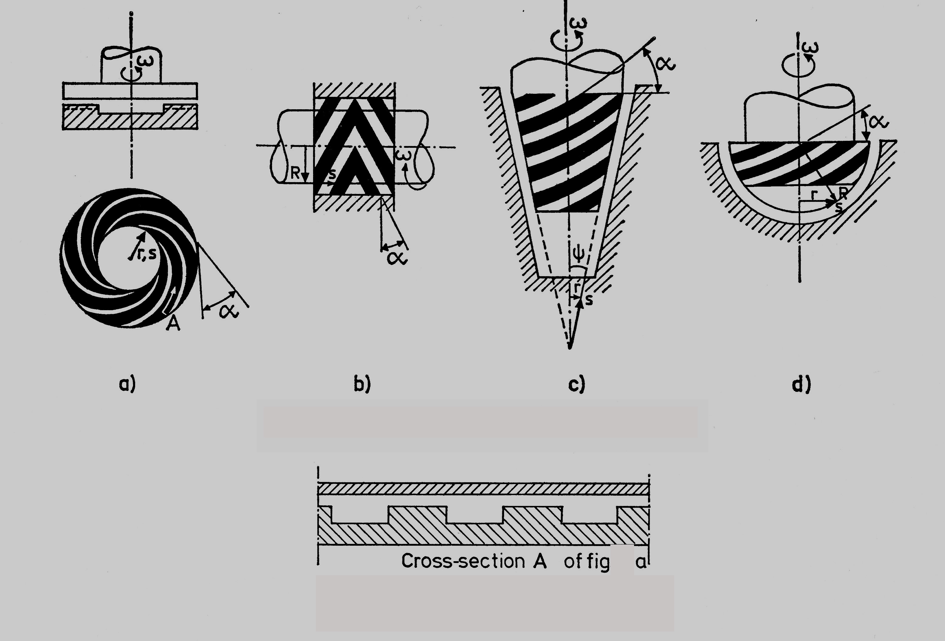 Zelf gemaakte afbeelding en opgenomen in mijn proefschrift 'Liquid lubricated spiral groove bearings', blz.1 (TU Delft, 1975)